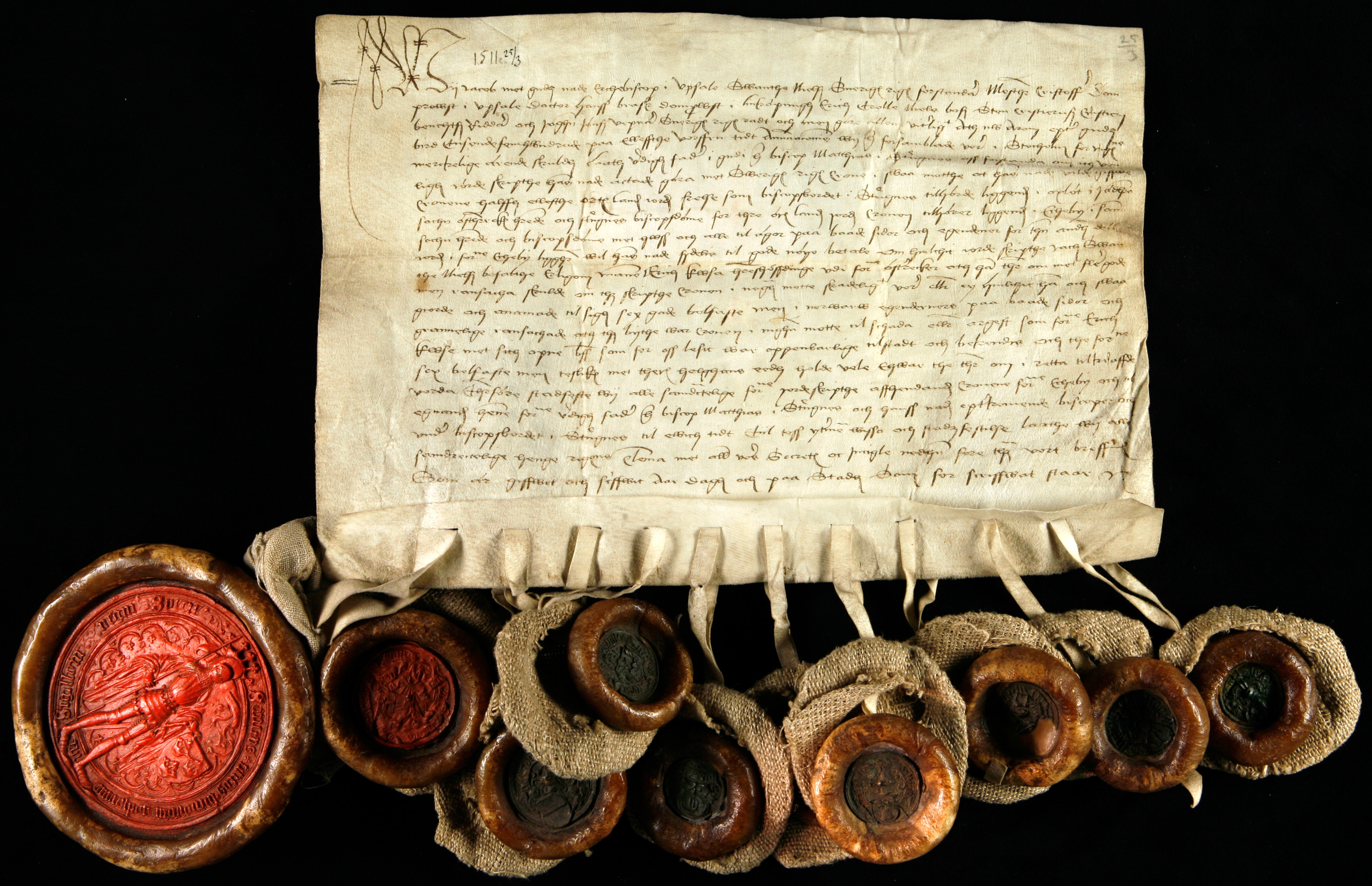 Sveriges rikes råd och män, Jakob, ärkebiskop i Uppsala, Svante Nilsson, riksföreståndare, mäster Kristofer, domprost i Uppsala, doktor Hans Brask, domprost i Linköping, riddarna Erik Trolle, Nils Bosson, Sten Kristiernsson och Kristiern Bengtsson samt väpnaren Johan Jönsson godkänner ett jordaskifte mellan biskop Mattias i Strängnäs och kronan, nämligen jord i Oxlöt mot jord i Ekeby i Jäders socken i Österrekarne härad. Riksklämman vidhänger tillsammans med utfärdarnas egna.